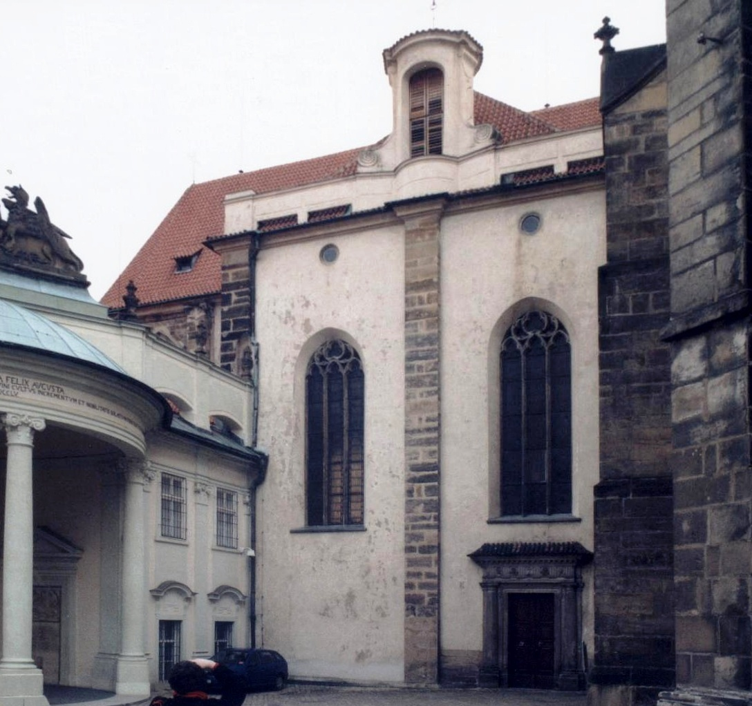 Kostel Všech Svatých na Pražském hradě